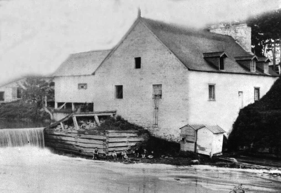 Le moulin Légaré avant 1902 La plus ancienne représentation du moulin avant la construction de la maison en 1902.